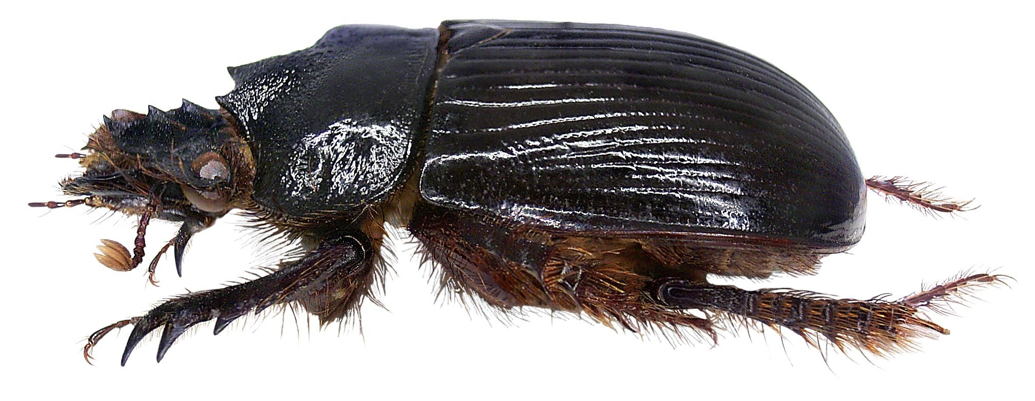 Familie: Scarabaeidae Grösse: 20-30 mm Verbreitung: Spanien, Portugal, Marokko Fundort: Spanien, Cadiz, 1976 Foto: U.Schmidt, 2007